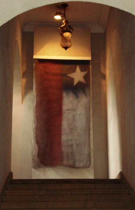 Bandera de Chile en la escalera de acceso al segundo piso del Palacio de la Moneda, en Santiago de Chile. Obra del artista plástico Ricardo Meza.